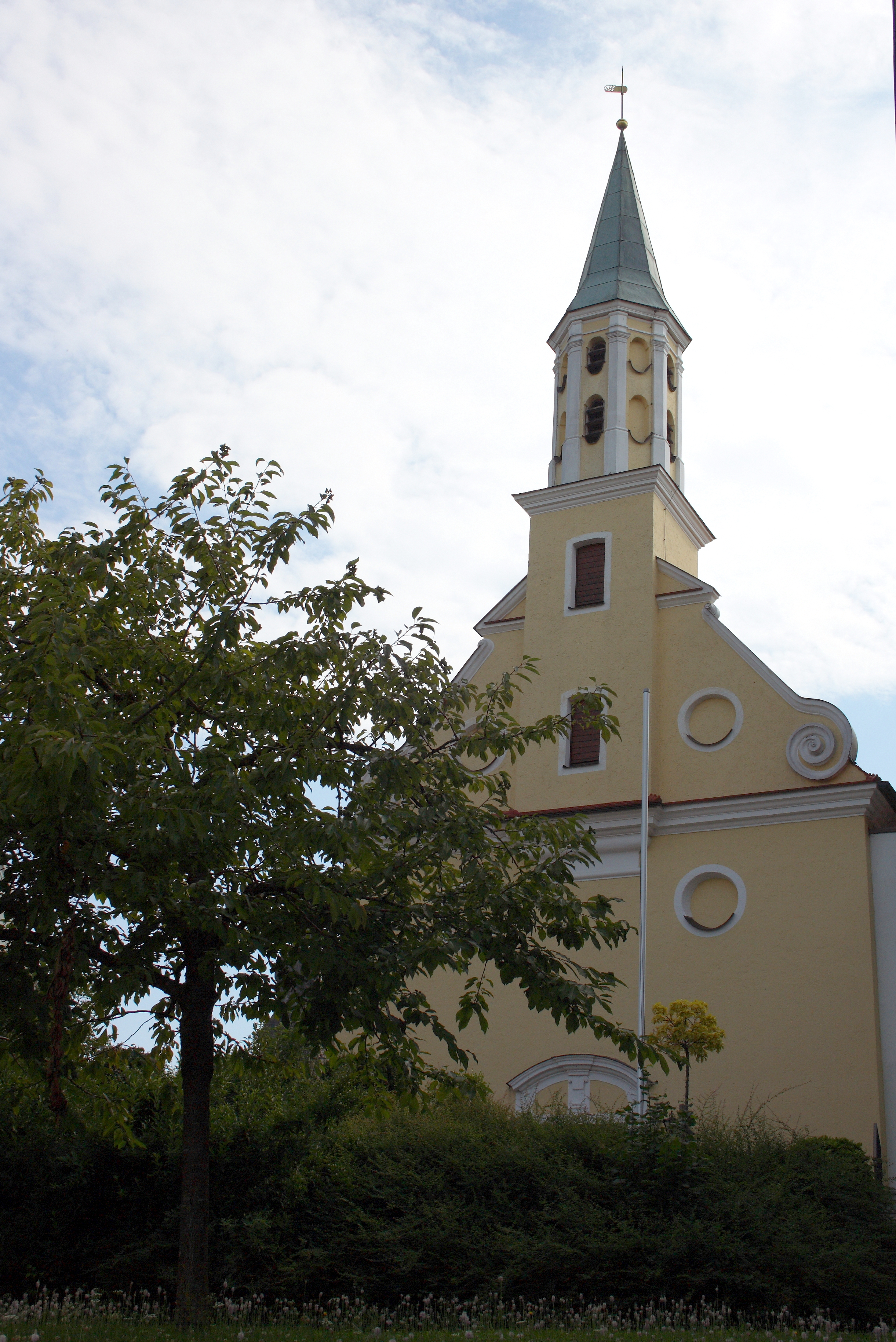 Katholische Pfarrkirche St. Maria Immaculata in Echenbrunn, einem Ortsteil von Gundelfingen im Landkreis Dillingen an der Donau (Bayern), Westfassade mit Dachreiter